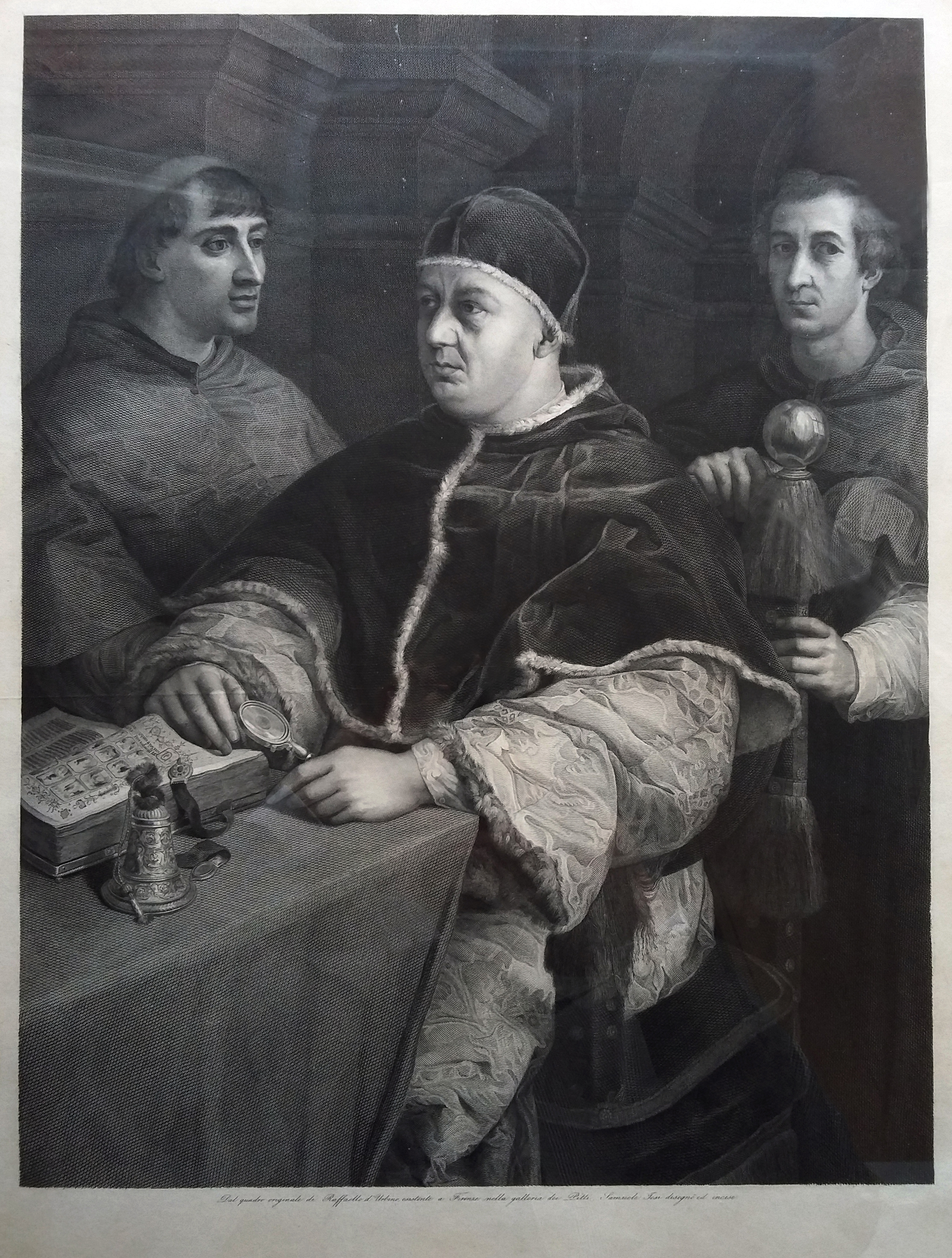 Titolo: "Leone X" Autore : Samuele Jesi (1788 - 1753) Autore del soggetto: Raffaello Sanzio ( 1483 - 1520) Tecnica: acquaforte e bulino DImensioni: 505 x 383 mm. Anno: 1844